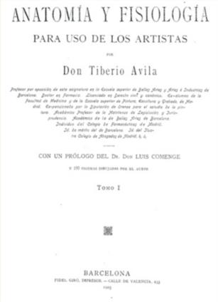 Anatomía y fisiología para artistas de Tiberio Ávila Rodríguez (1843-1932).